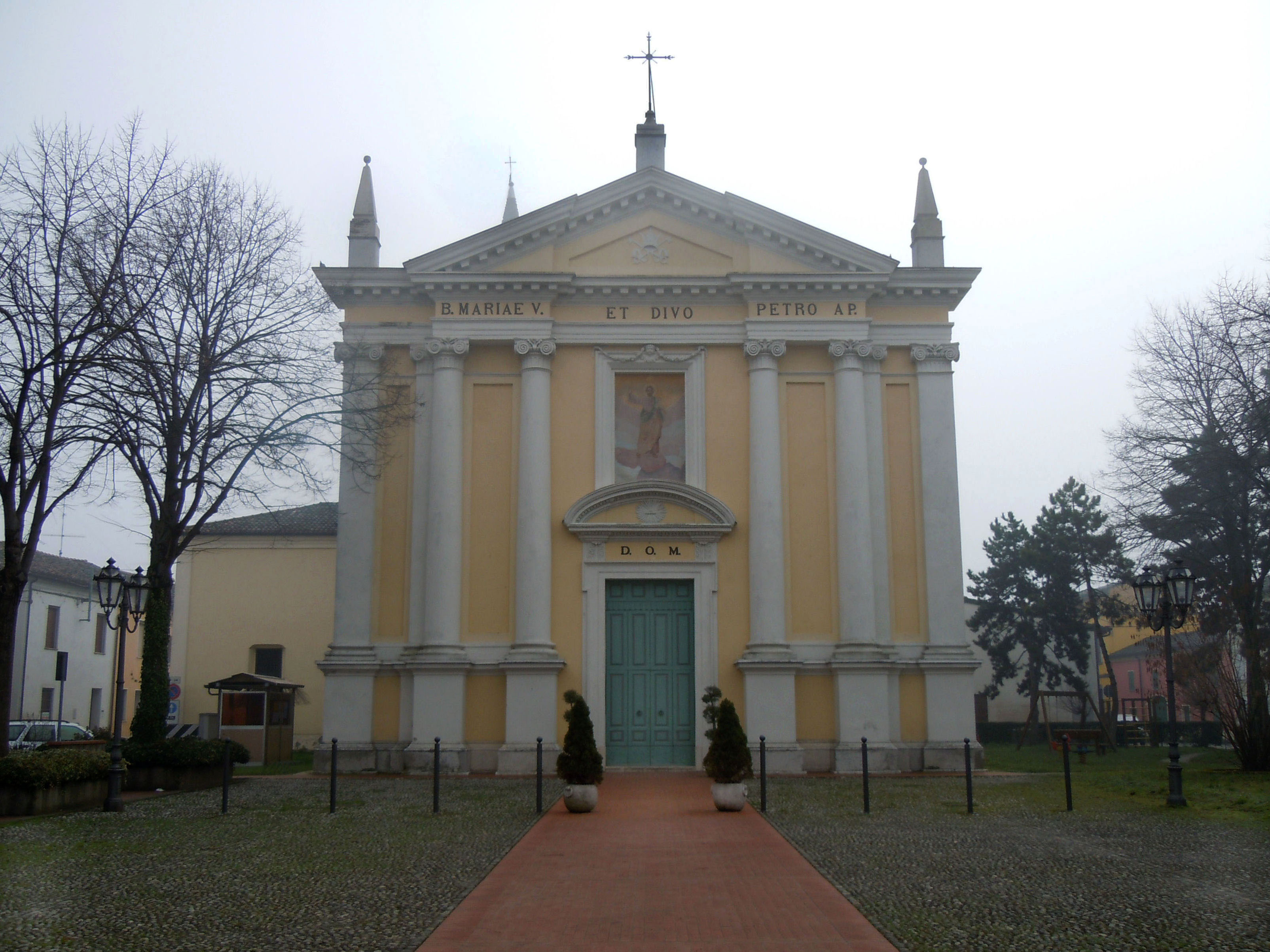 Volongo, la chiesa.